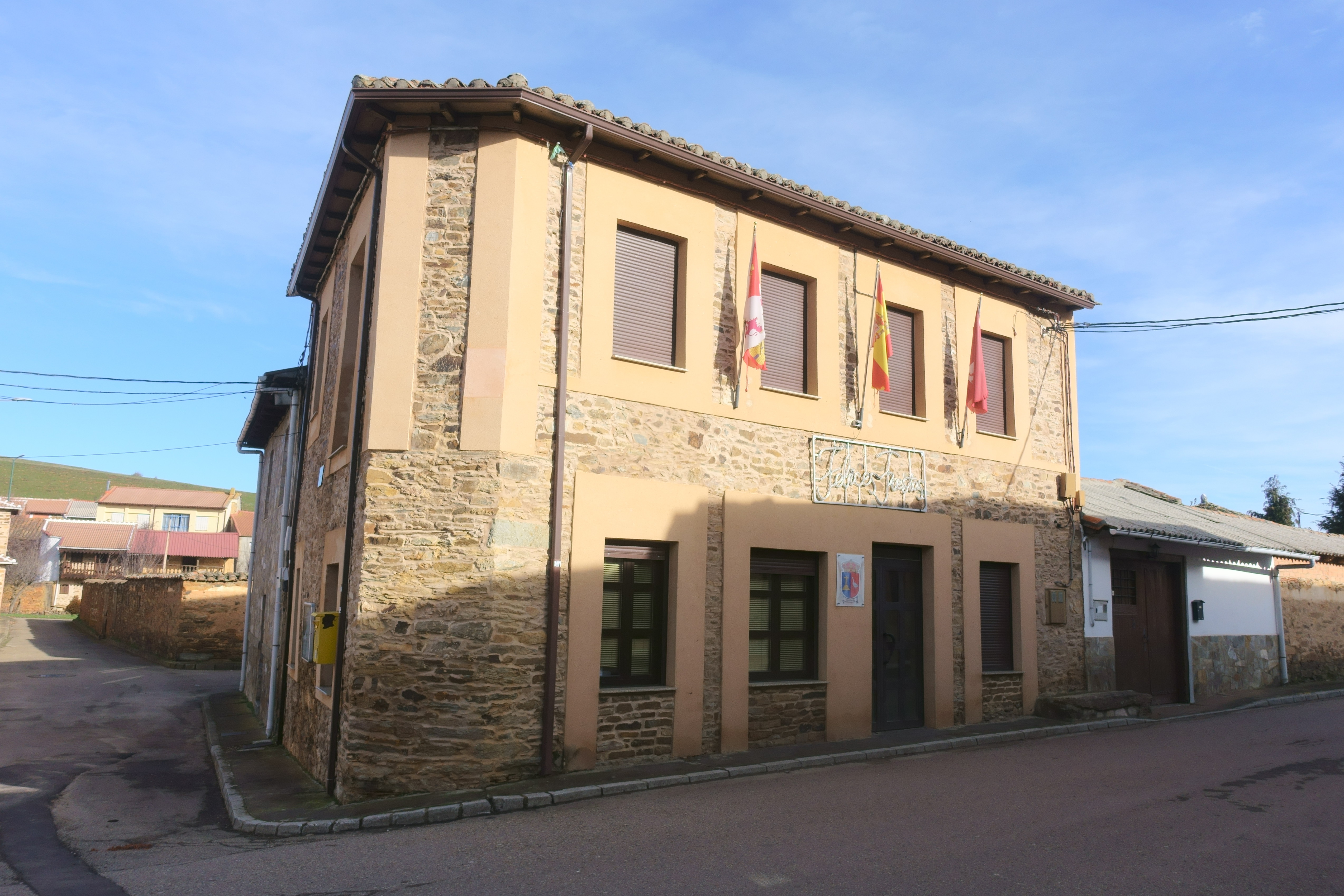 Casa consistorial de Brazuelo (León, España).